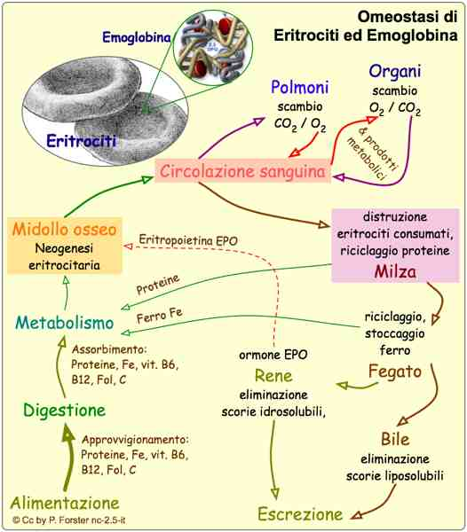 Grafica: Medicina: Fisiologia: Ematologia: omeostasi, eritrociti, emoglobina, midollo osseo circolazione sanguigna, milza, fegato, rene, proteine, ferro Fe, eritropoietina EPO, vitamina, B6, B12, C, acido folico, medicina popolare, complementare, laica, non convenzionale